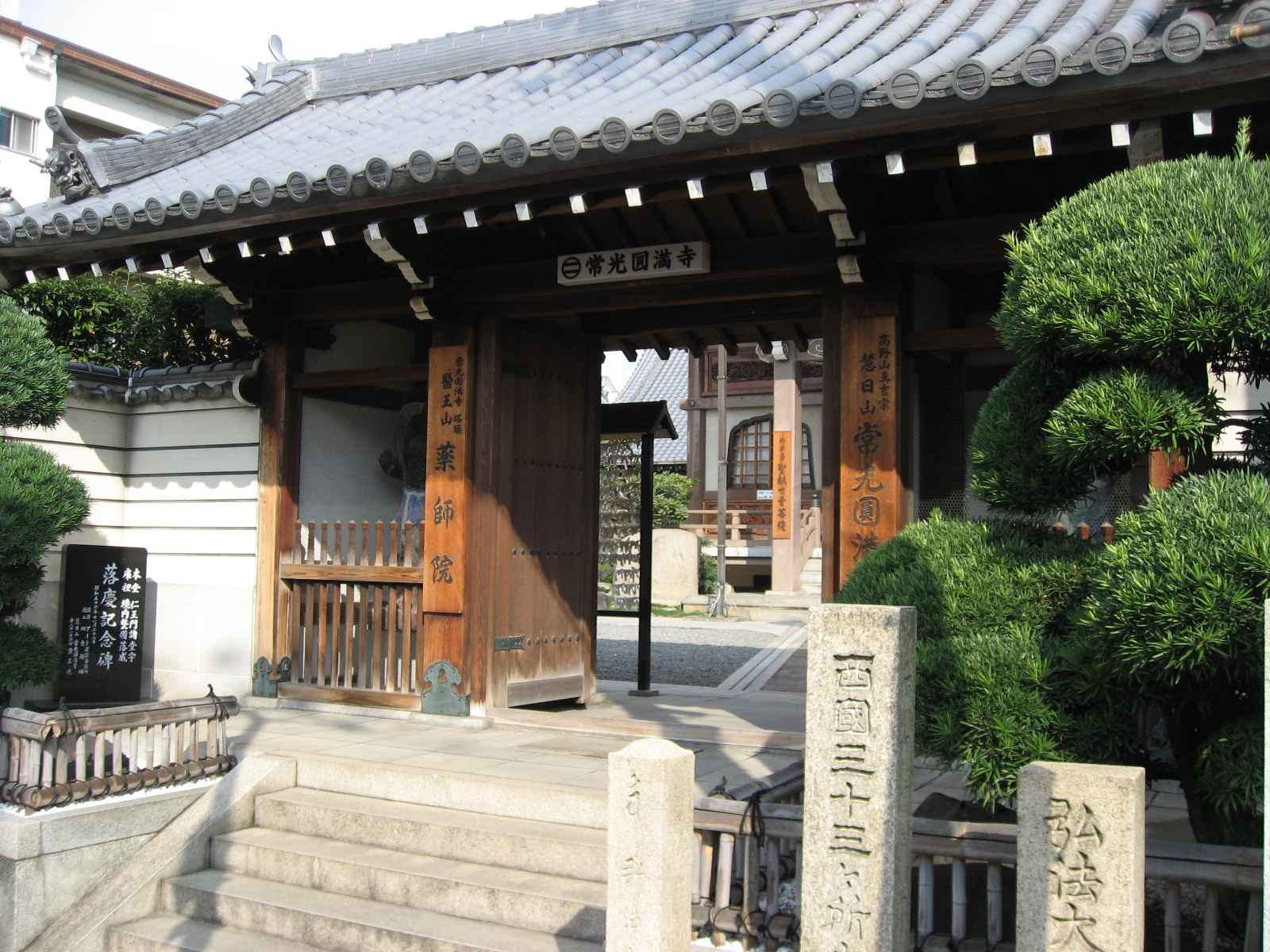 仁王さまが常光円満寺の参拝者を見守りくださいます